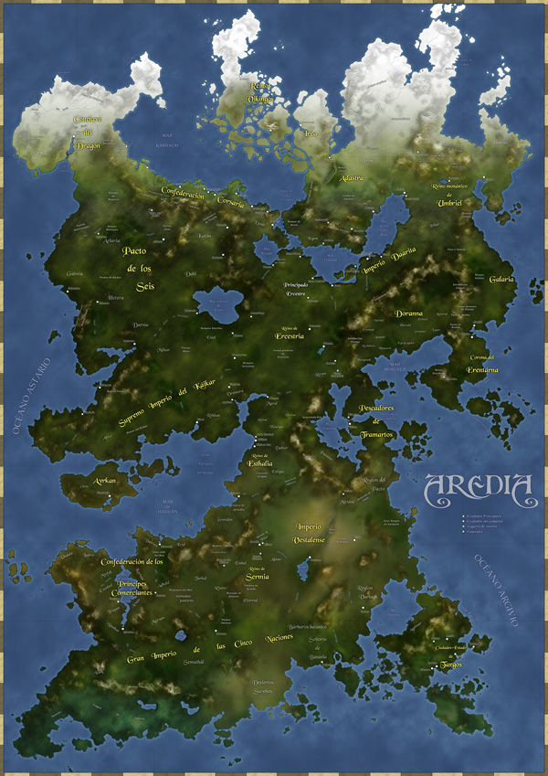 El continente de Aredia, escenario de campaña para rol medieval.